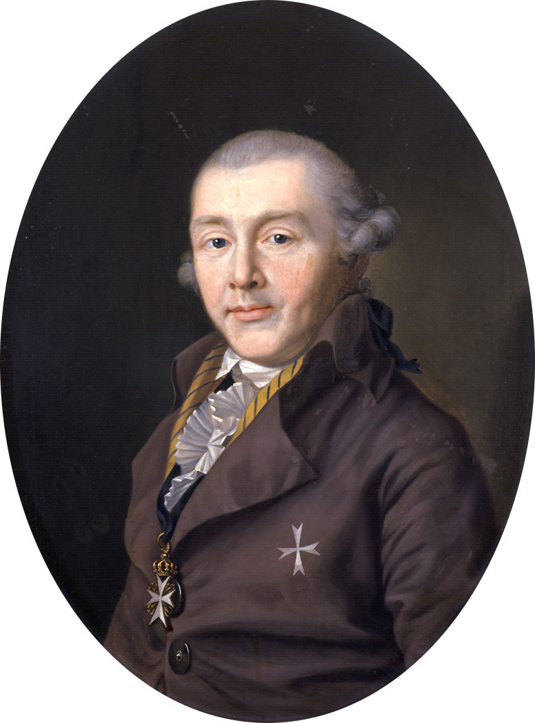 Portrait of August von Sachsen-Gotha-Altenburg (1747-1806)